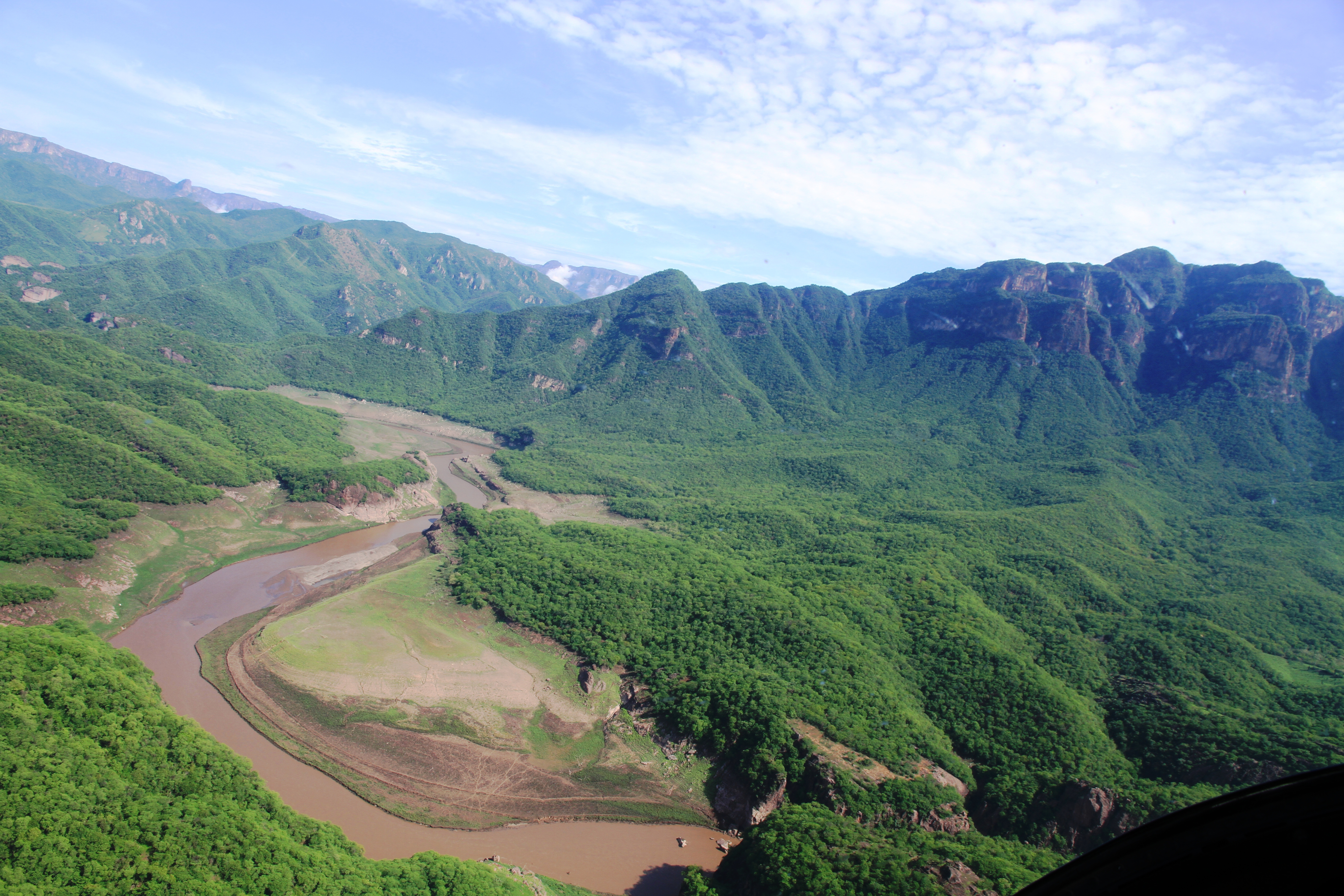 Río Chínipas